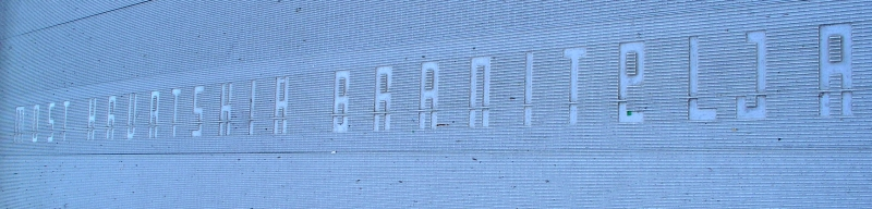 most Hrvatskih branitelja, Rijeka